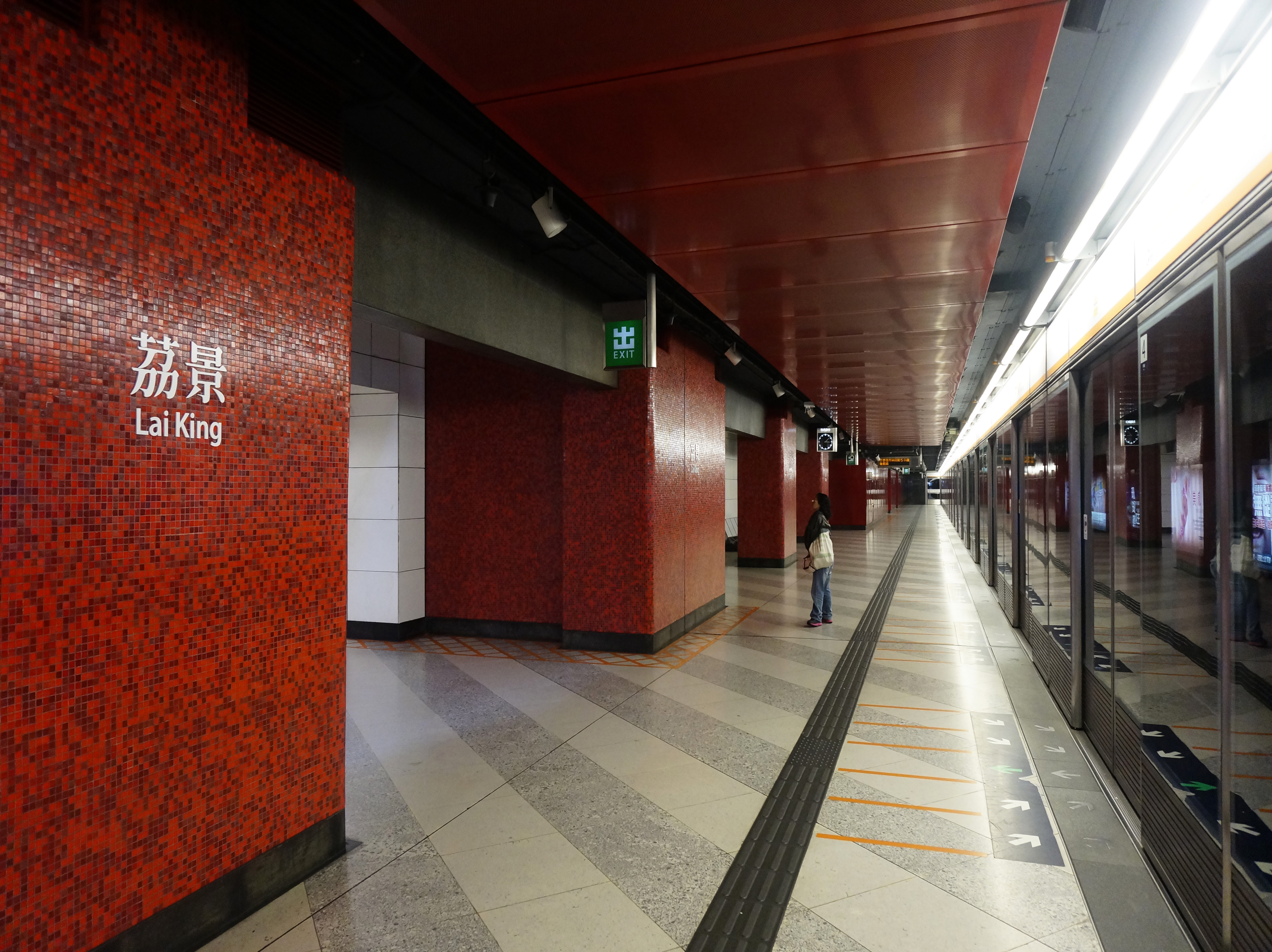 港鐵荔景站東涌線月台